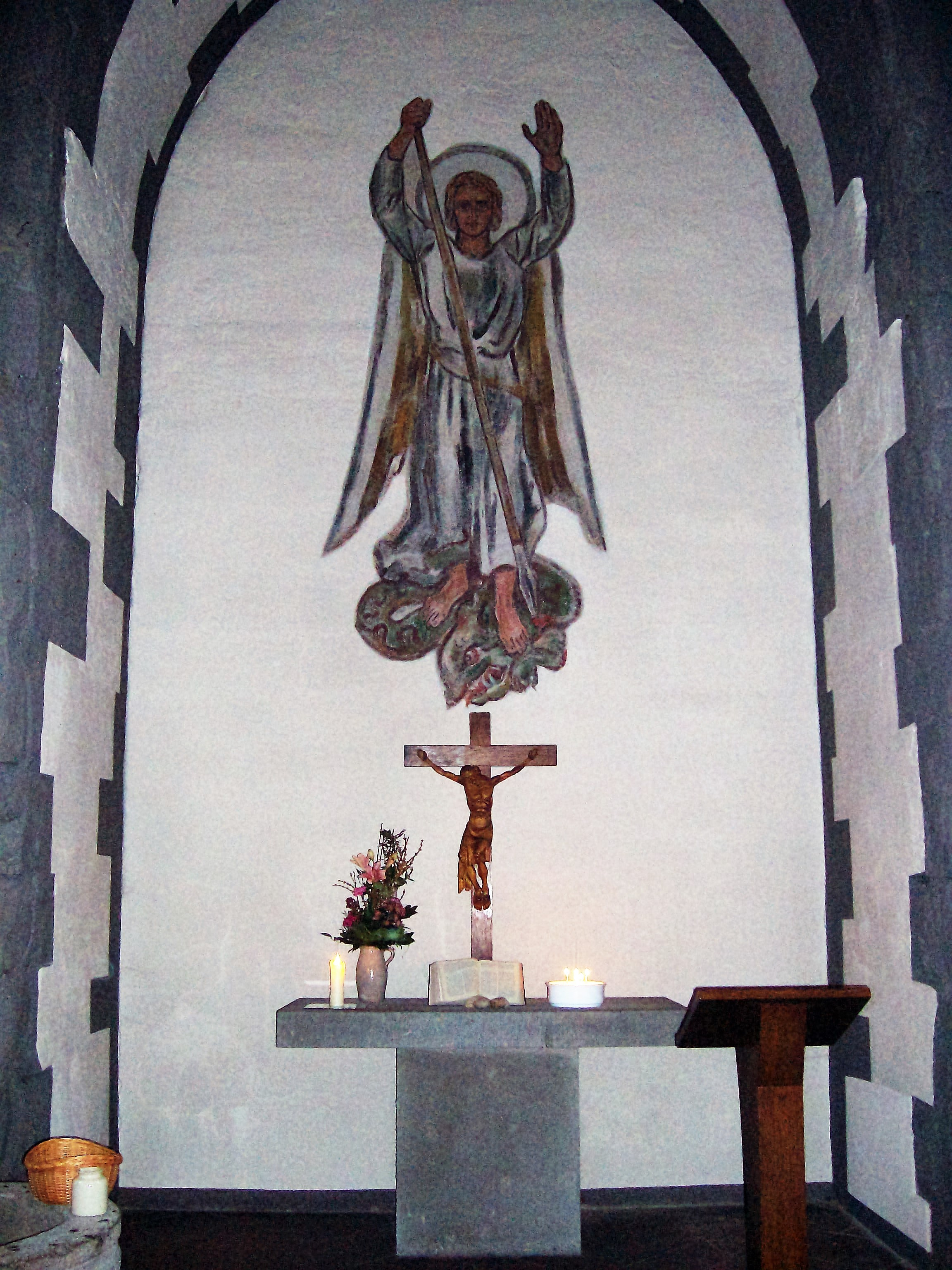 Michaeliskapelle im Stadtkirchenturm Gießen, Hessen, Deutschland